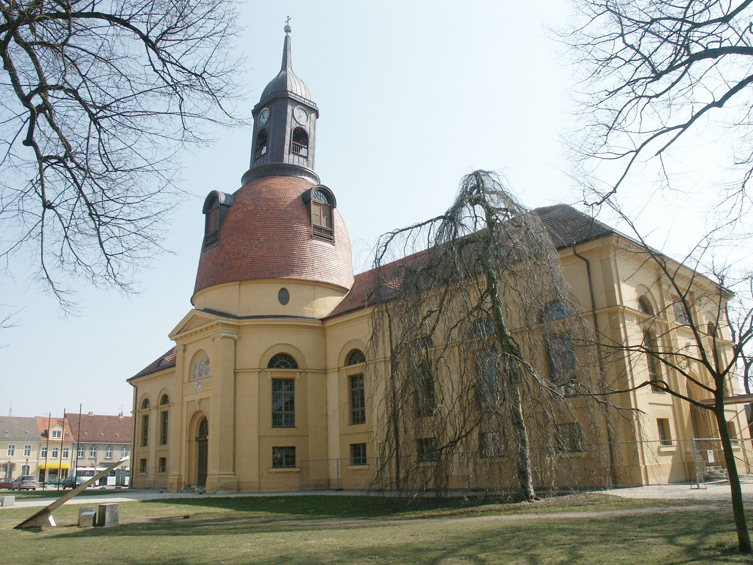 Pfarrkirche Sankt Marien Neuruppin